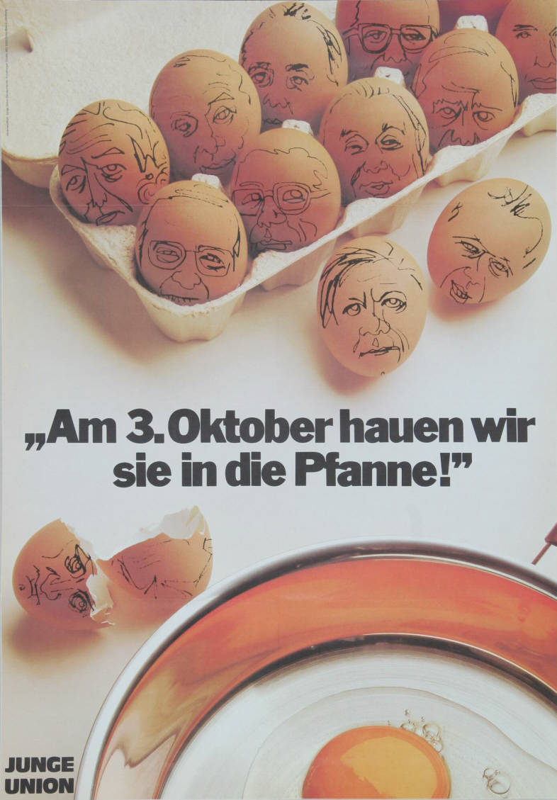 "Am 3. Oktober hauen wir sie in die Pfanne!" Abbildung:Karikaturen - mit Köpfen bemalte EierPlakatart:Motiv-/TextplakatAuftraggeber:Bundesgeschäftsstelle der Jungen Union Deutschlands, Bonn-Bad GodesbergObjekt-Signatur:10-001: 1875Bestand:Plakate zu Bundestagswahlen (10-001)GliederungBestand10-18:Plakate zu Bundestagswahlen (10-001) » Die 8. Bundestagswahl am 3. Oktober 1976 » MotivplakateLizenz:KAS/ACDP 10-001: 1875 CC-BY-SA 3.0 DE